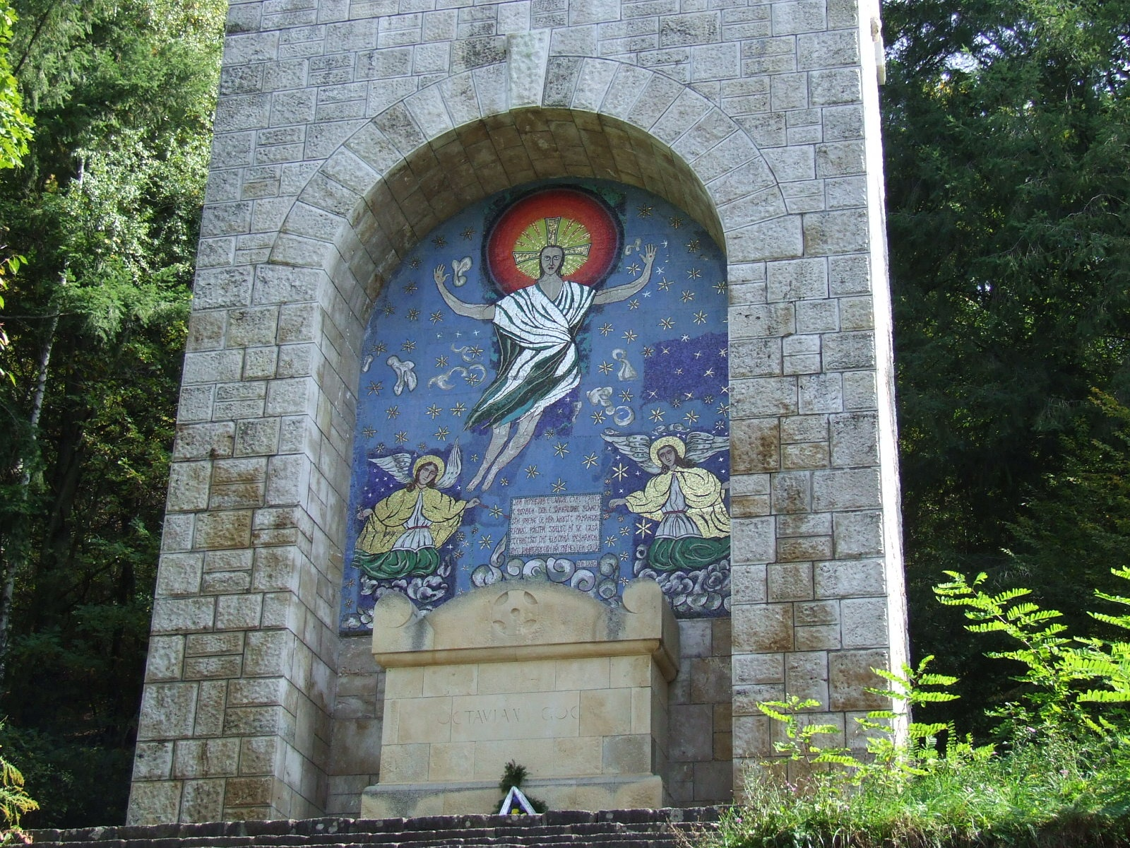 Ciucea castle, Cluj County, Romania